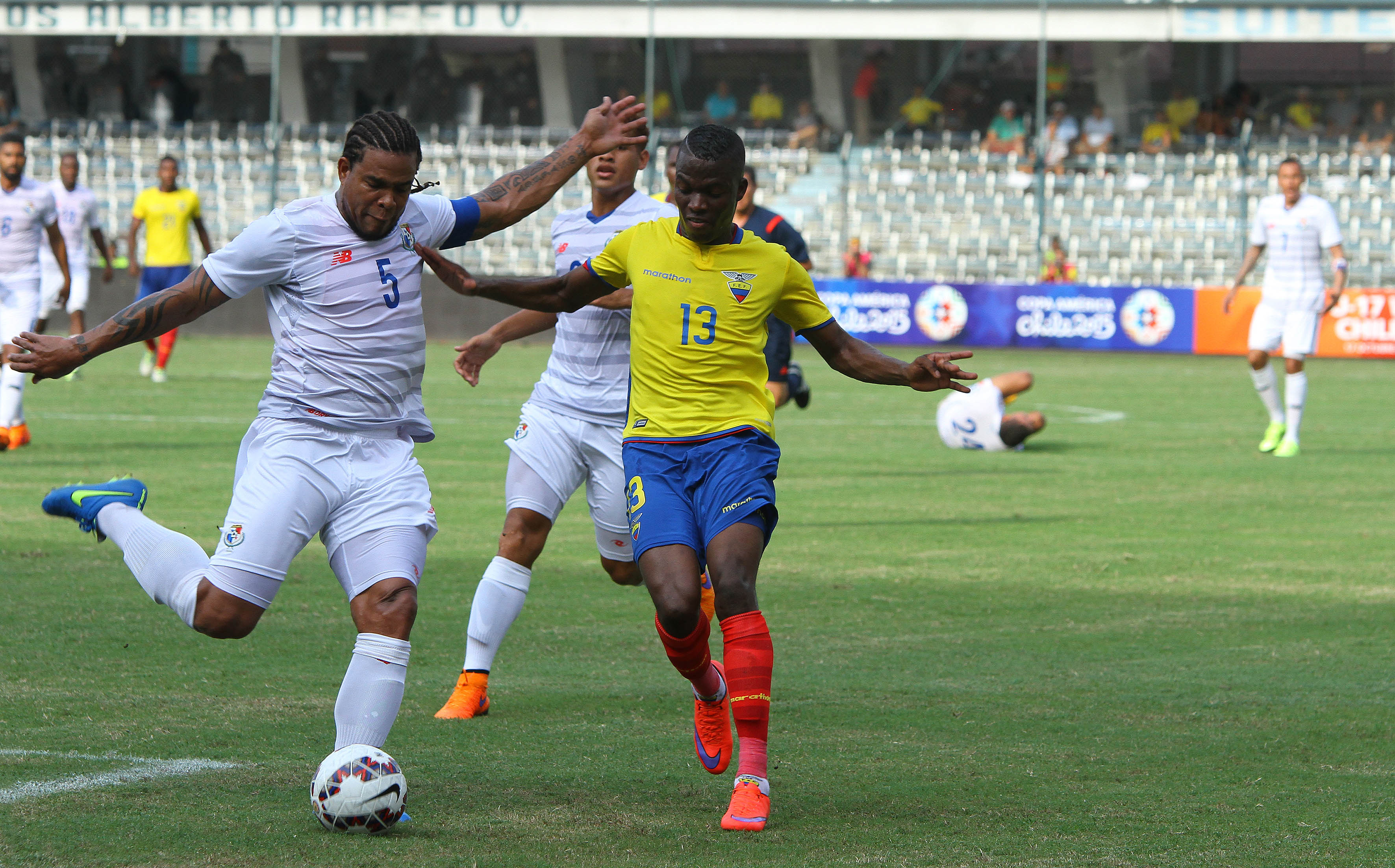 Guayaquil, 06 de jun (Andes).-En el estadio George Capwell, la selección de fútbol de Ecuador se enfrenta a Panamá en partido amistoso Foto: César Muñoz/Andes